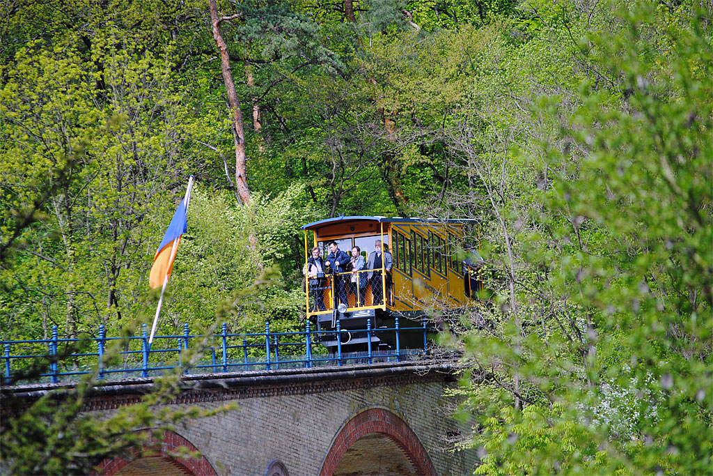 Nerobergbahn auf dem Weg zur Talstation